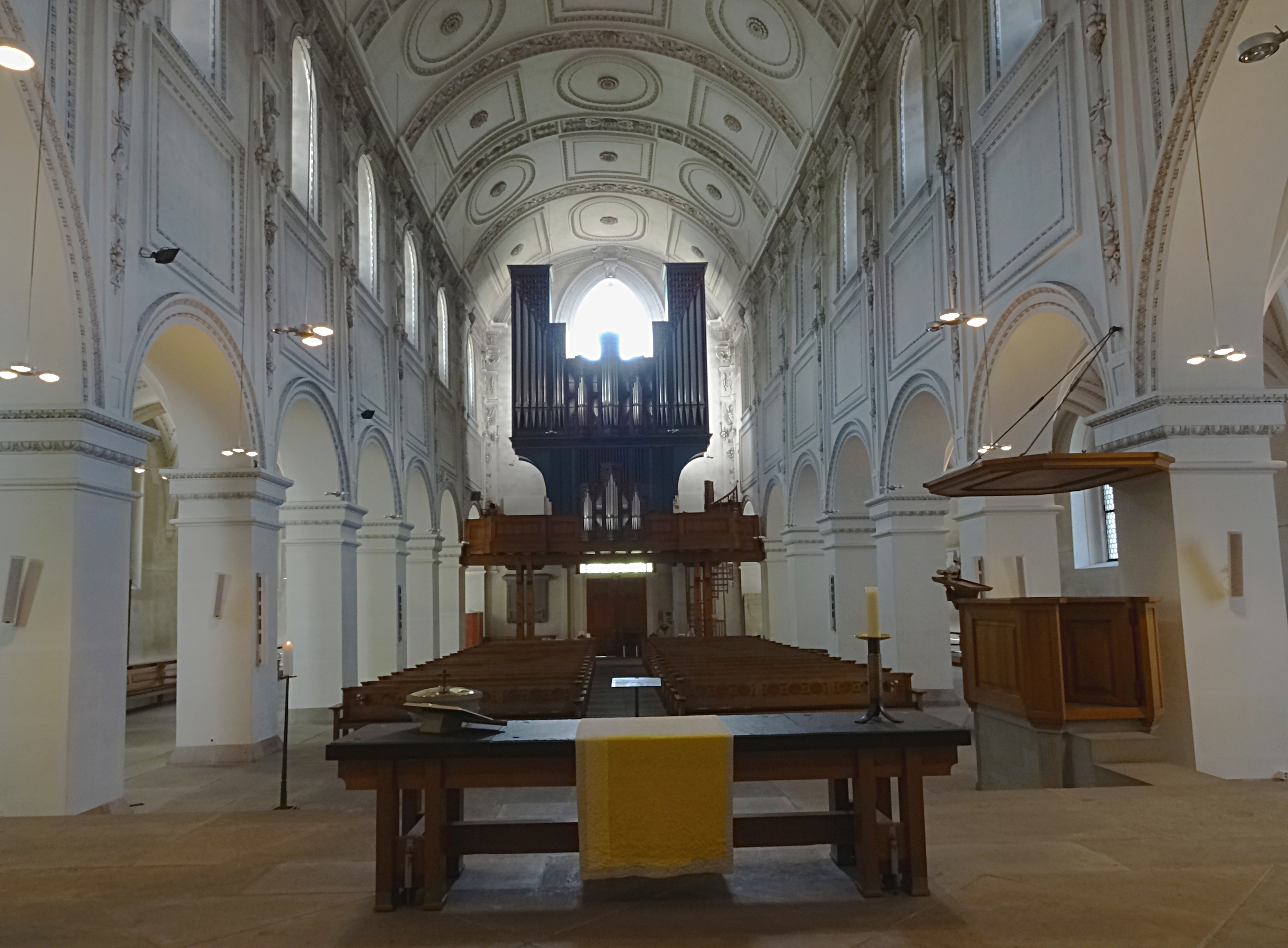 Innenansicht der Predigerkirche in Zürich